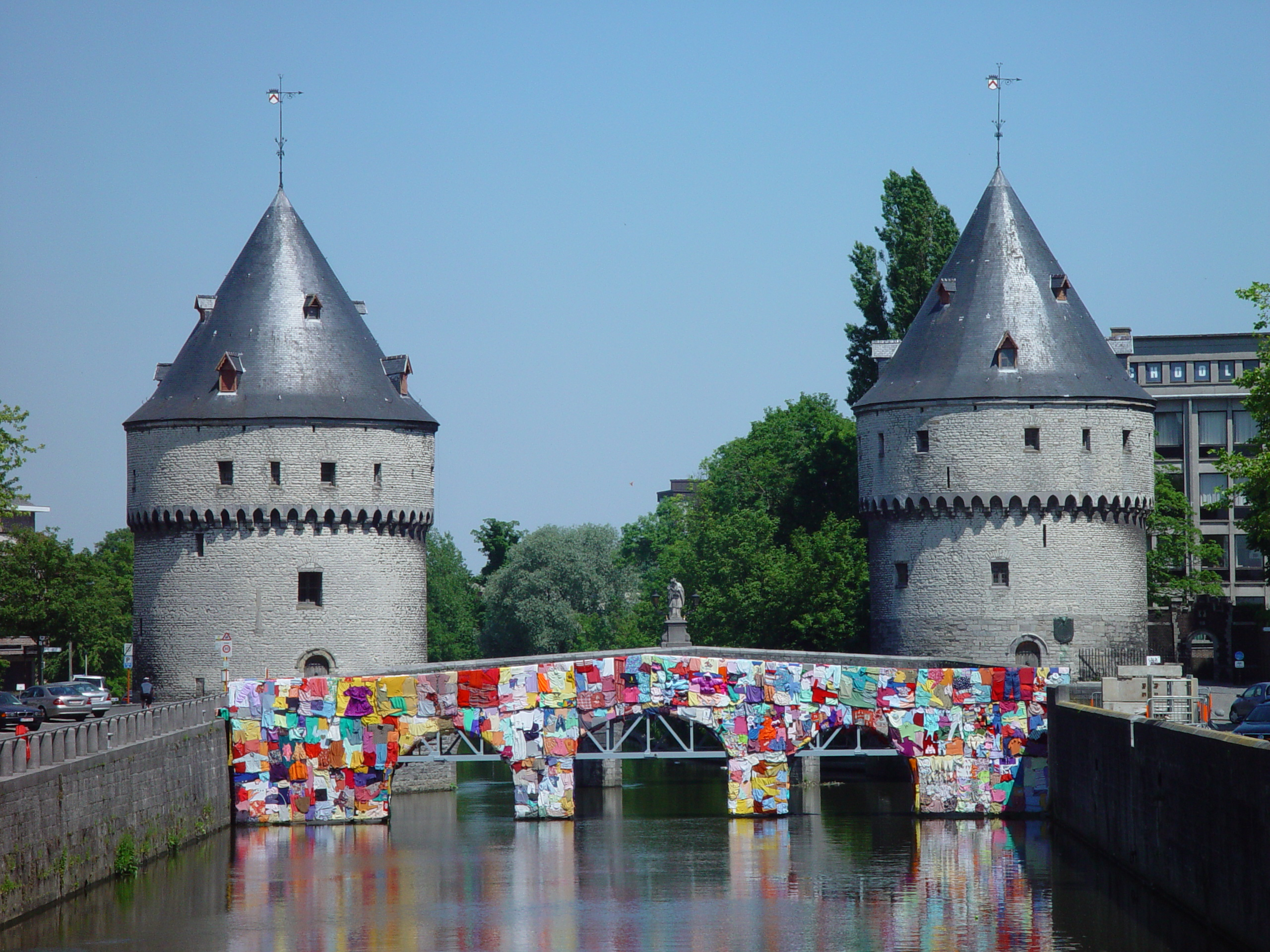 Broelkaai nr. 35. BROELTORENS. Beschermd als monument bij B.V.E. van 9.03.1983. Twee imposante torens, gelegen ten noordoosten van de stad, en die oorspronkelijk deel uitmaakten van de middeleeuwse versterkingen, die vanaf 1353 uitgebouwd werden. De twee torens, worden met elkaar verbonden door de Broelbrug of Hoge Brug die wederopgebouwd werd na W.O. II. Bron: WVL5 Auteurs: De Gunsch, Ann; De Leeuw, Sofie & Metdepenninghen, Catheline